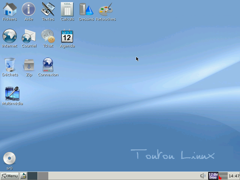 Premier écrans après installation